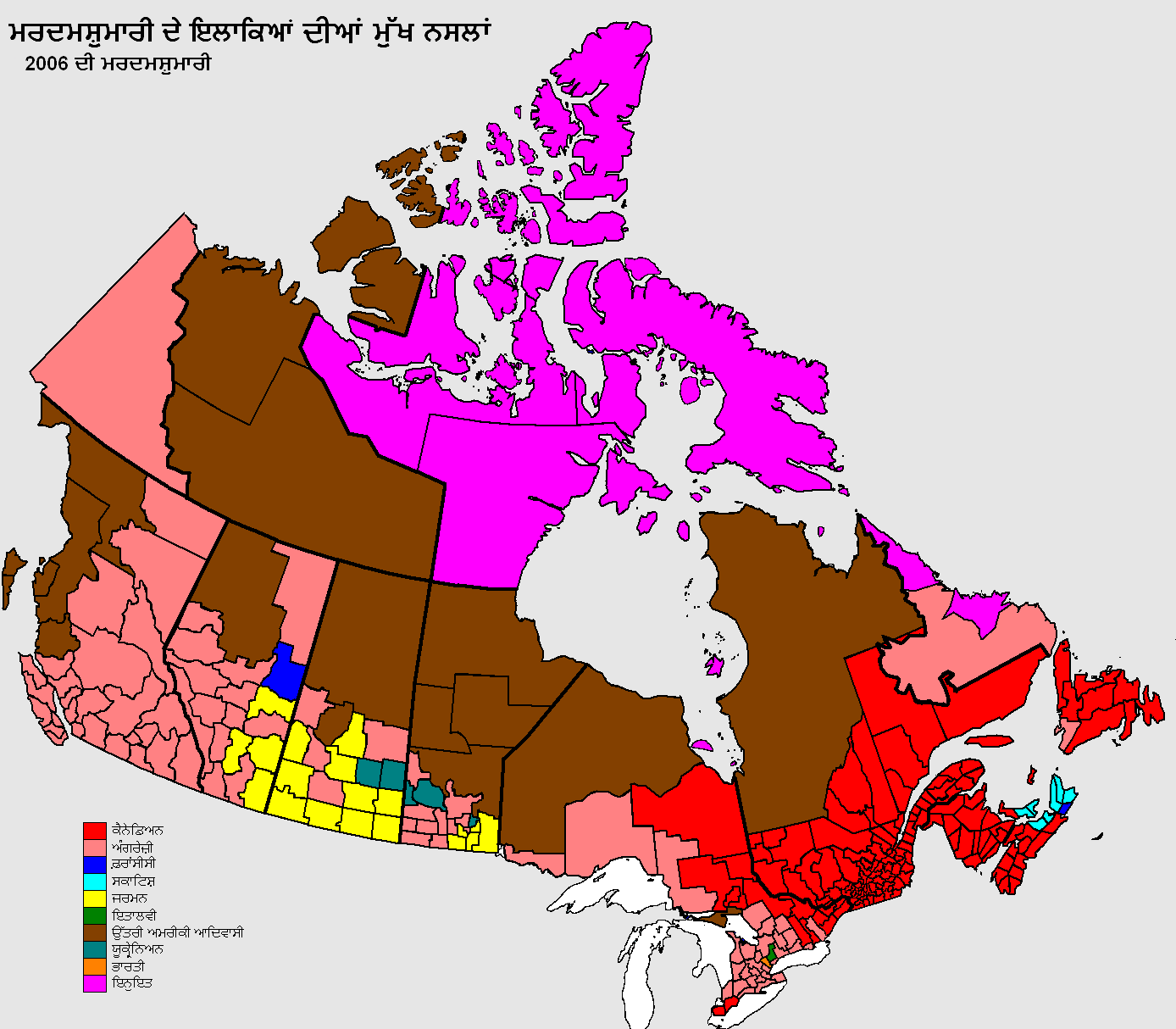 ਪੰਜਾਬੀ: ਮਰਦਮਸ਼ੁਮਾਰੀ ਦੇ ਇਲਾਕਿਆਂ ਦੇ ਮੁੱਖ ਨਸਲ